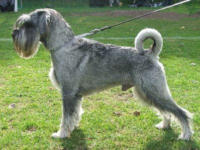 Ottamani kuva omasta koirastani.